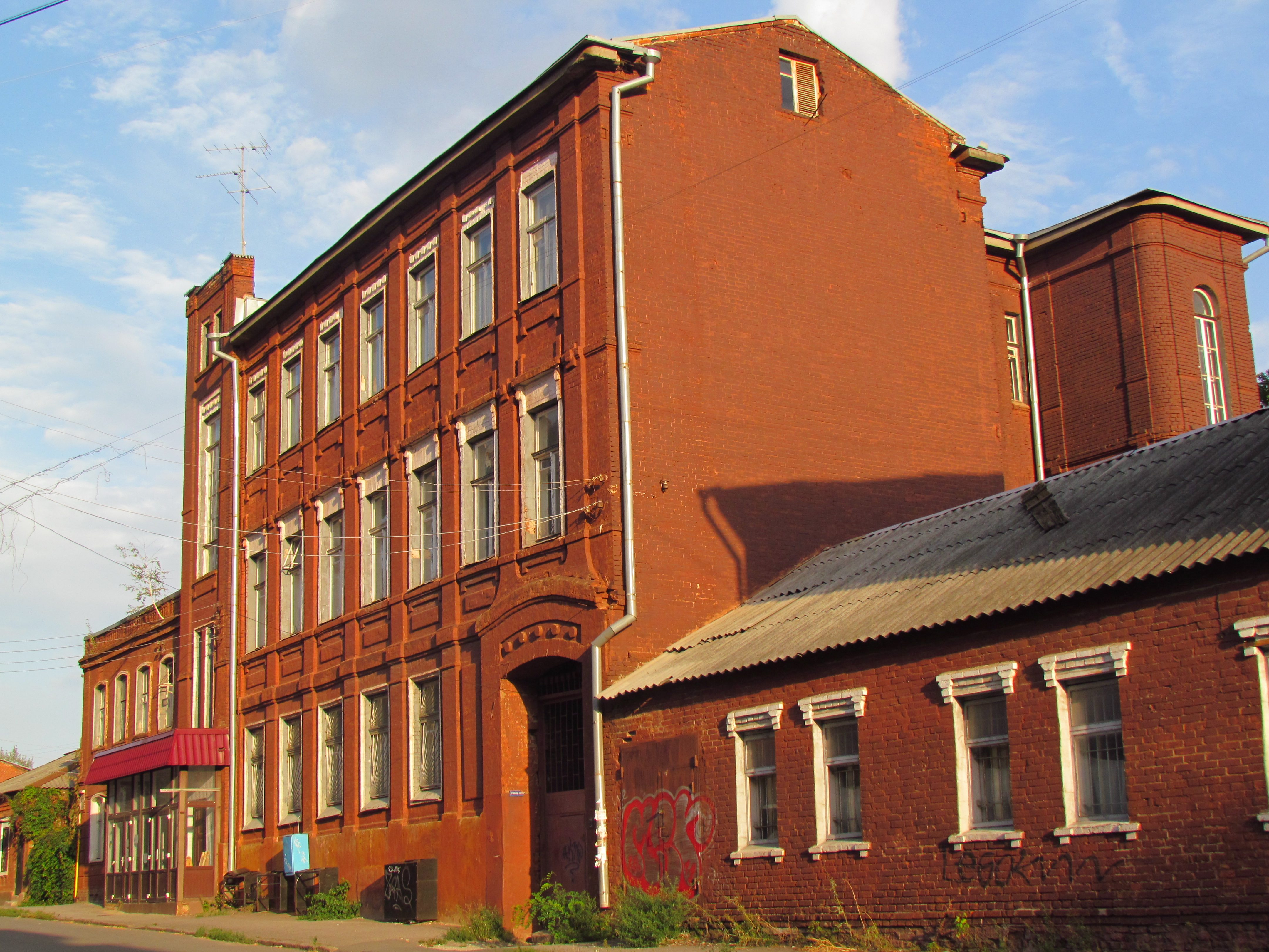 Україна, Харків, вул.Демченка, 6